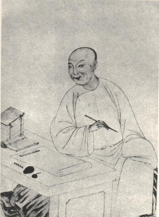 胡渭，清代学者。Hu Wei